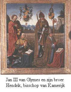 Johann III. van Glymes, Herr von Bergen und sein Bruder Henri de Berghes, Bischof von Cambrai